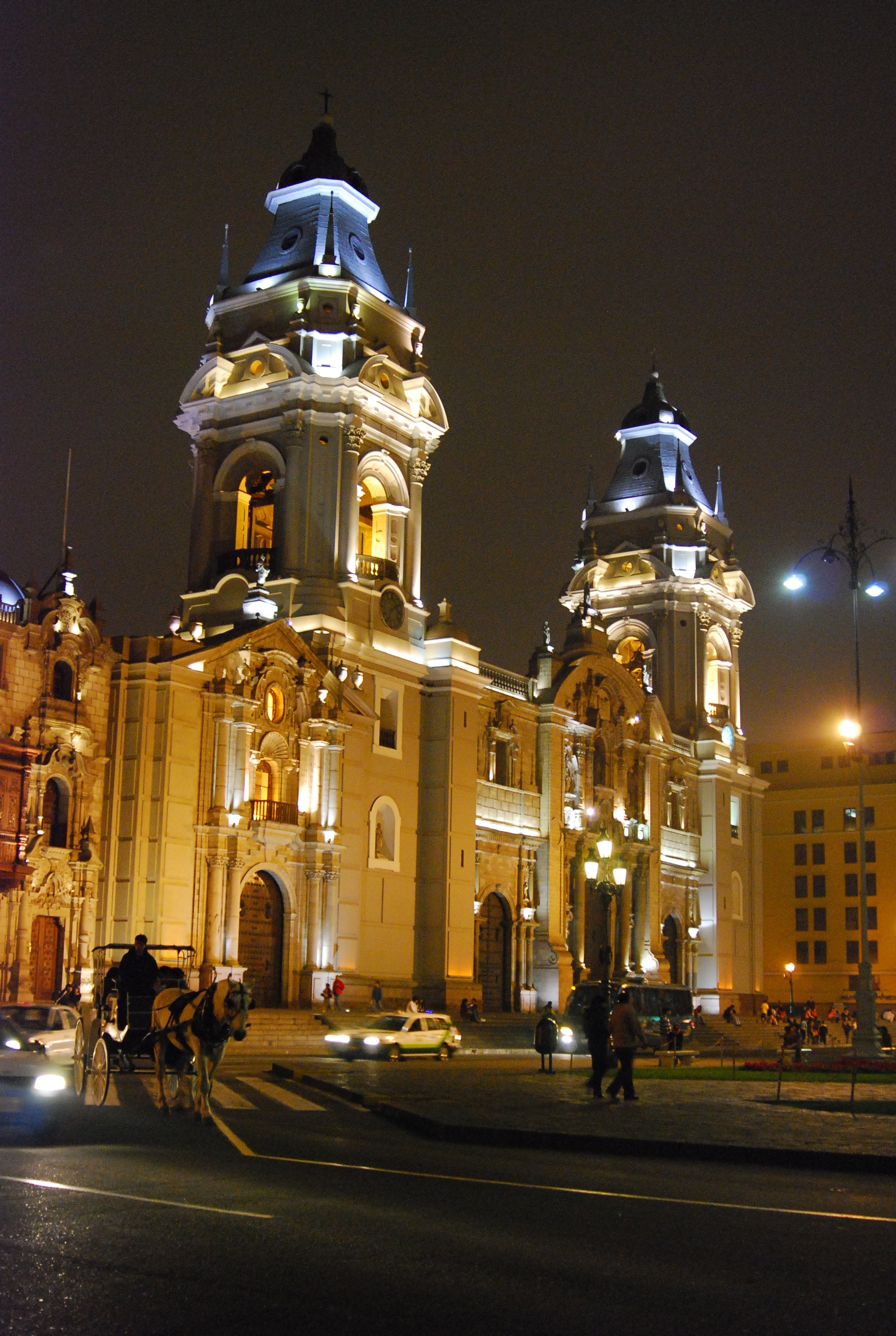 La Catedral de Lima